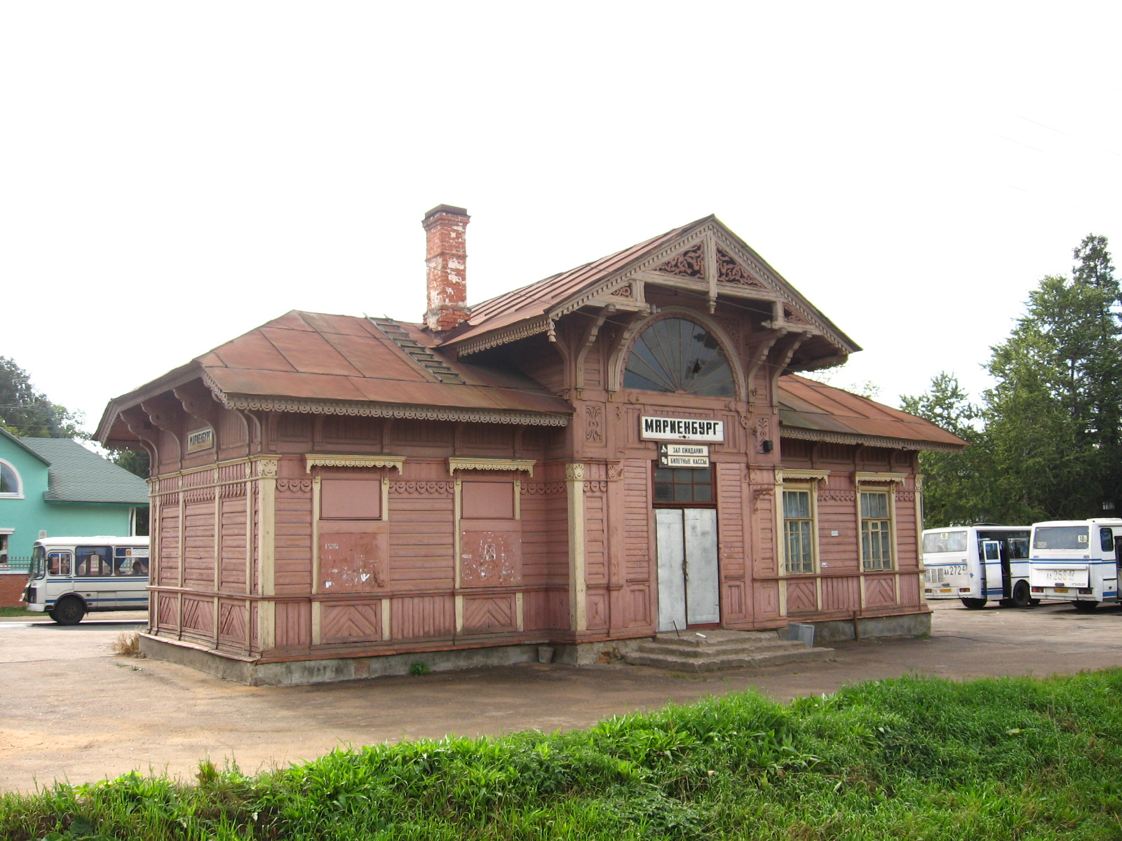 Здание железнодорожной станции Мариенбург (Гатчина). Станция находится на балтийской ветке Октябрьской железной дороги, здание построено в 1879 году, архитектор Пётр Станиславович Купинский (1838—1923)